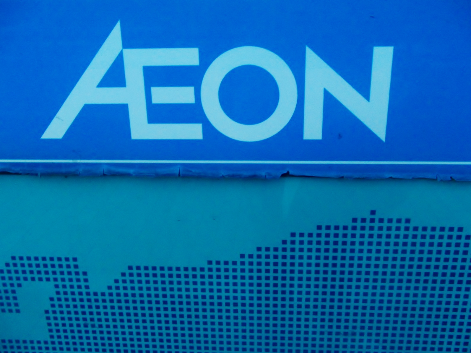 著作権者である私はこの作品に対するすべての権利を放棄いたします